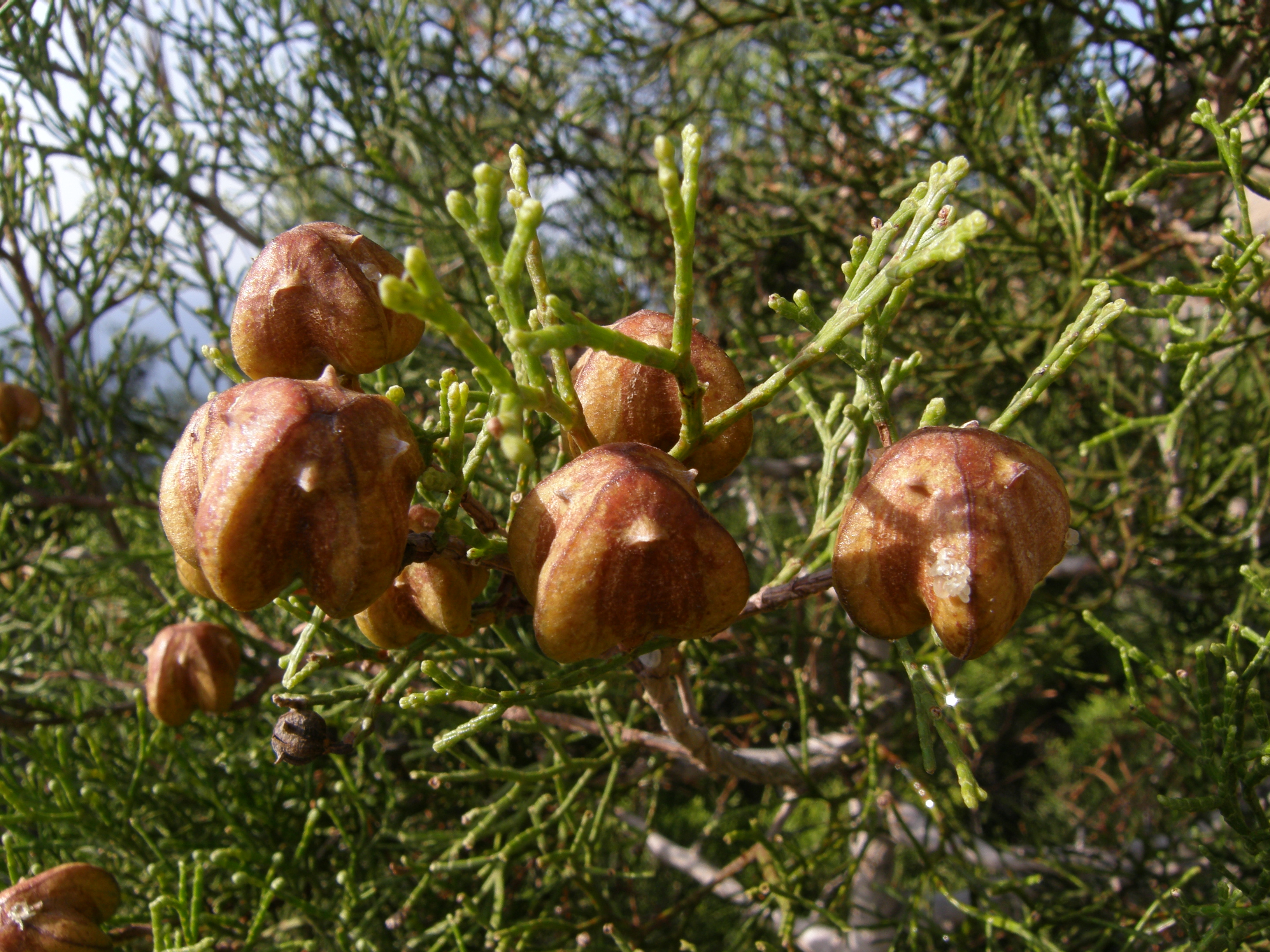 Conos del Araar Tetraclinis articulata en el Parque Nacional de Alhucemas (Marruecos)